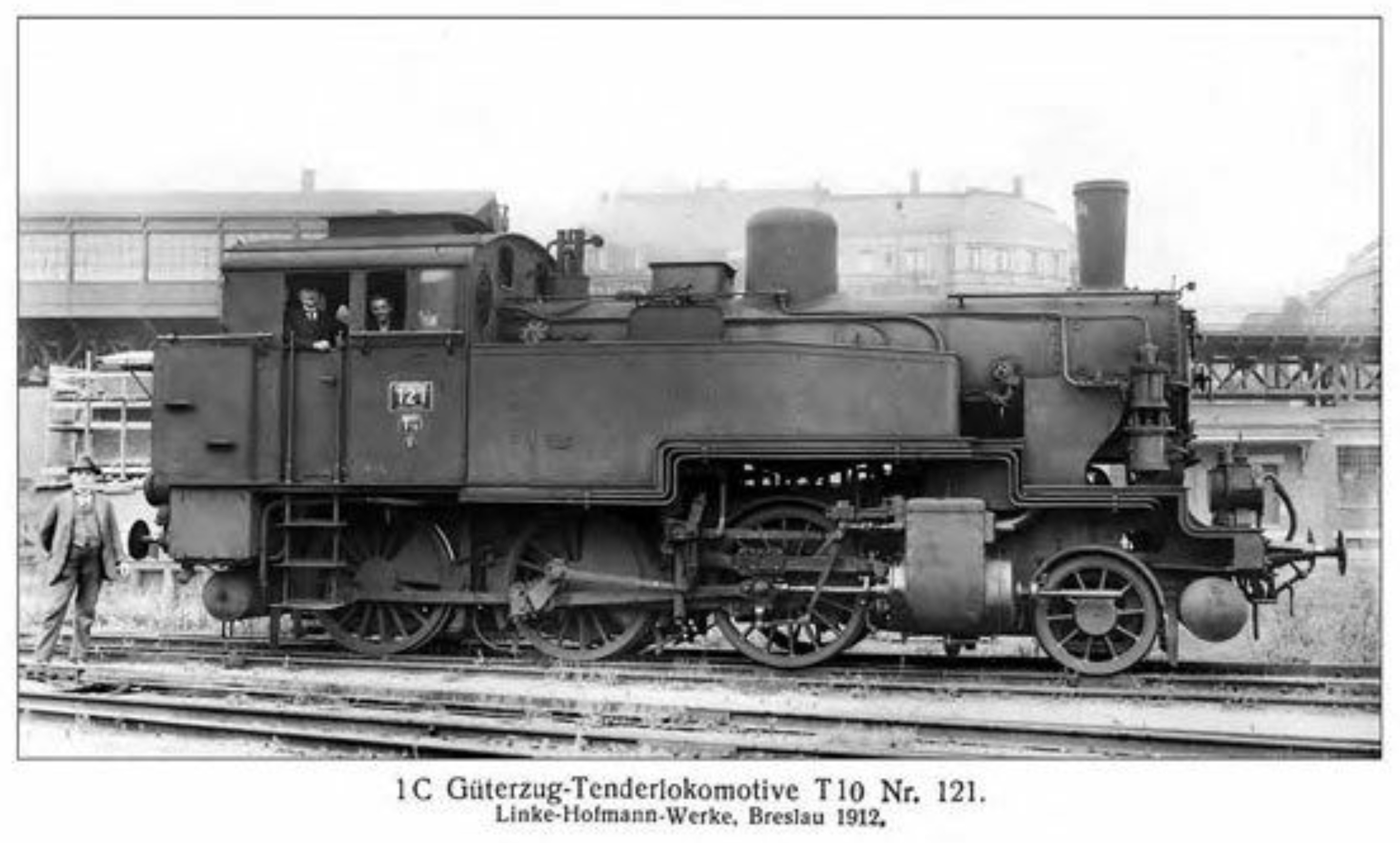 Damplokomotive der Bauart T 10 der Lübeck-Büchener Eisenbahn, Nr. 121 (1938 74 363, 1950 verschrottet)